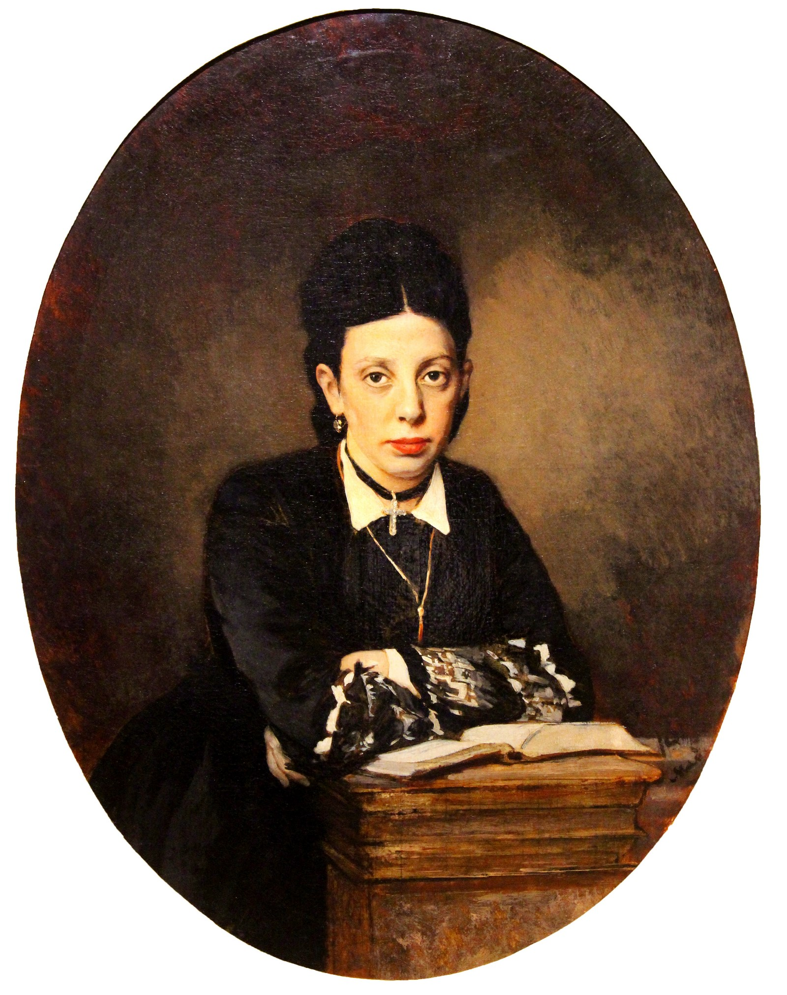 Чистяков П.П. 1832-1919 Женский портрет. 1872 Холст, масло. Национальный художественный музей Республики Беларусь